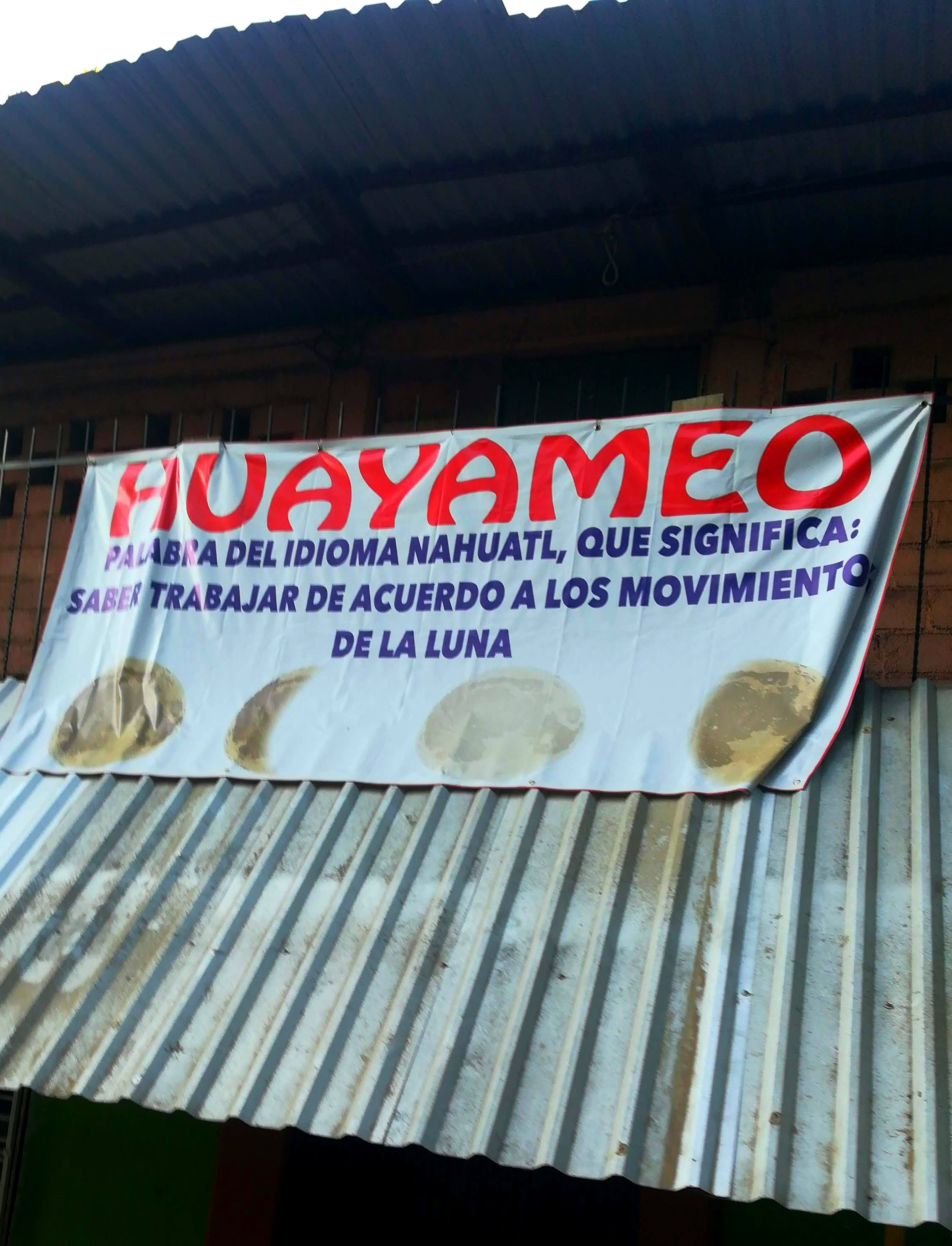 Guayameo proviene de Huayameo, palabra del idioma Nahuatl, que significa: “Saber trabajar de acuerdo a los movimientos de la luna”.